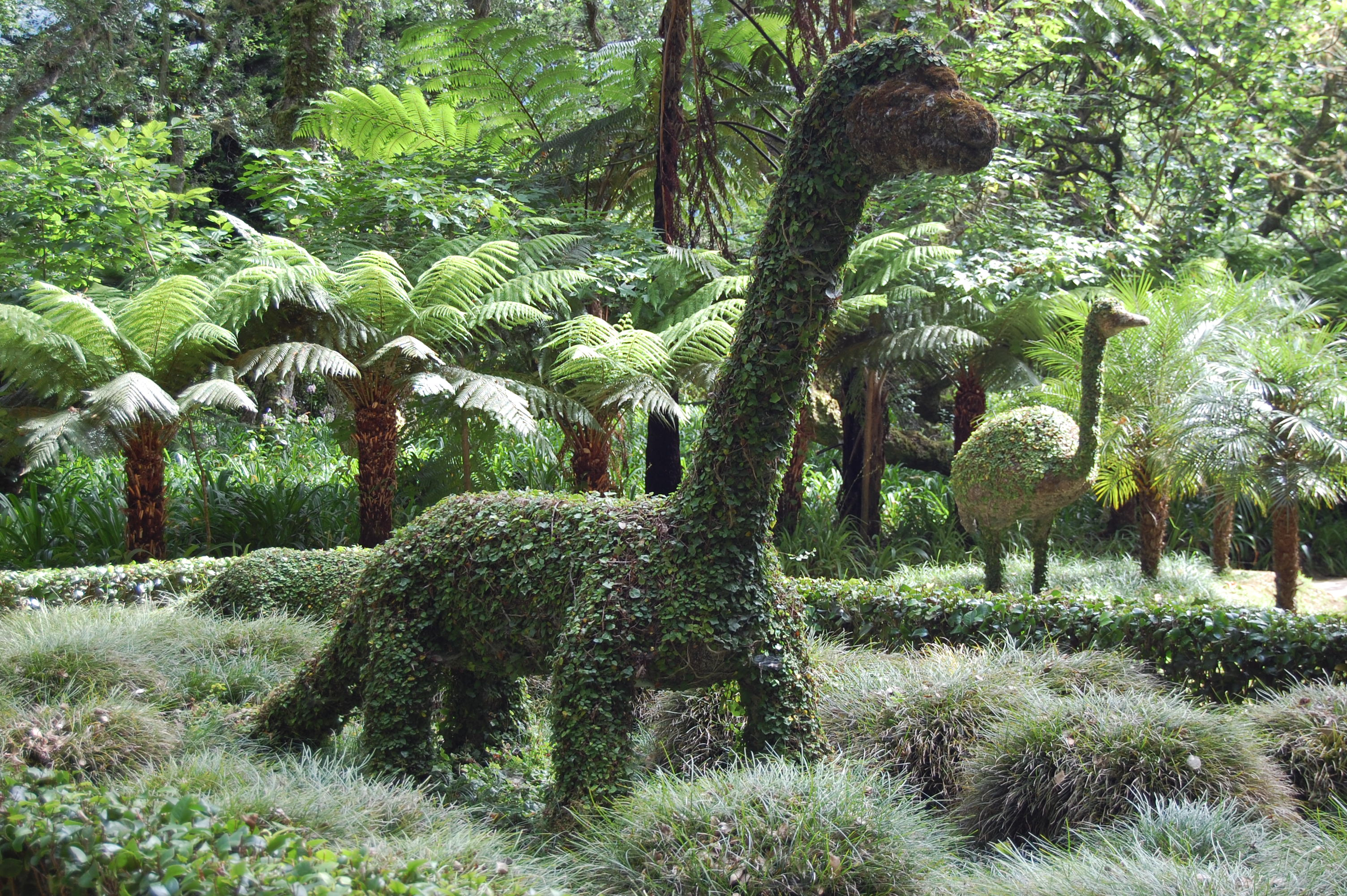 Furnas. Parco Terra Nostra. Gli animali di pietra